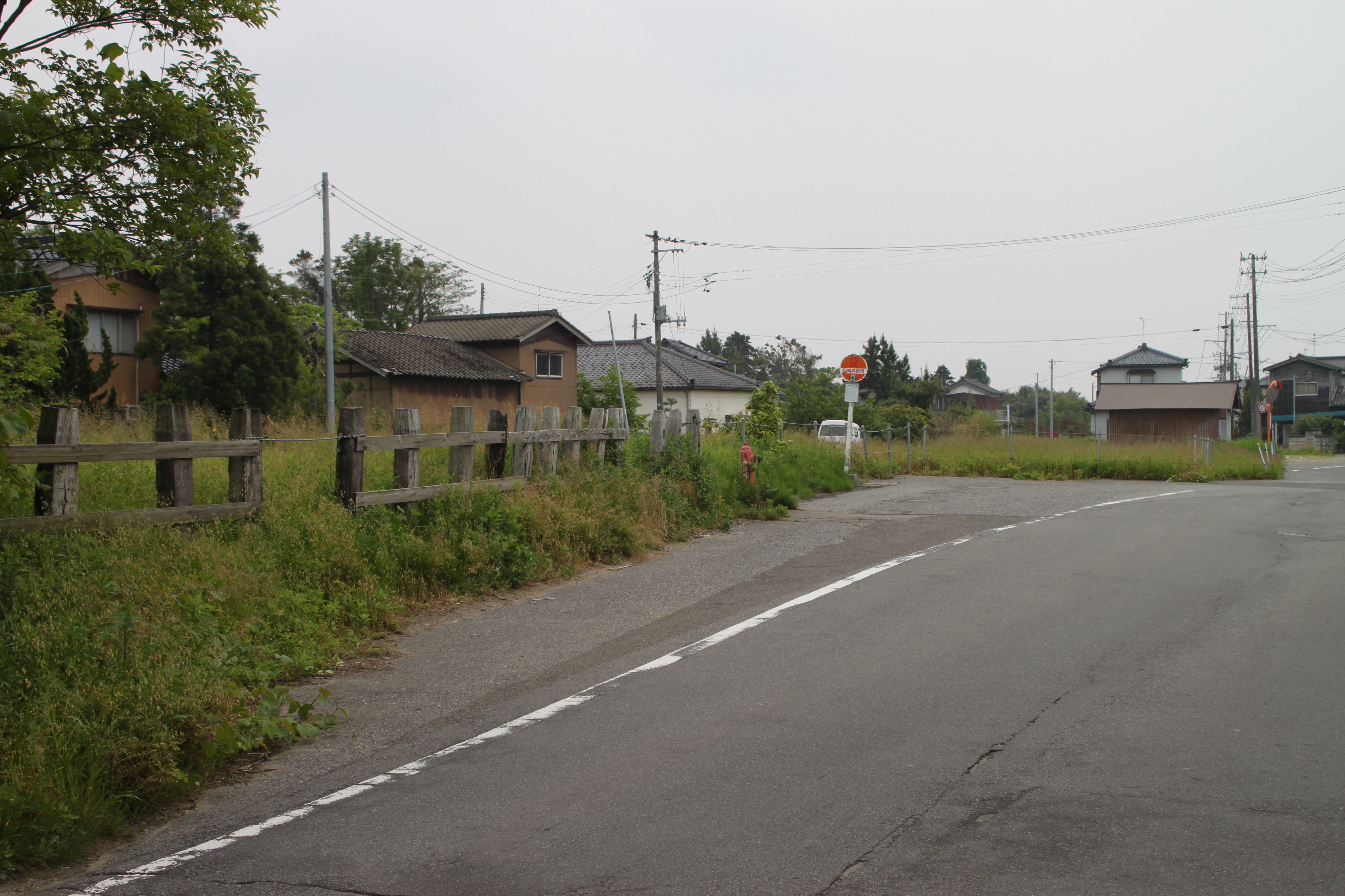 新潟交通木場駅跡。枕木の柵の内側に駅舎があり、バス停の標識の先が入口だった。駅舎の前には自転車小屋があり、駅舎撤去後もしばらく残っていた。周辺には農業関係の建物がたくさんあったが今はない。